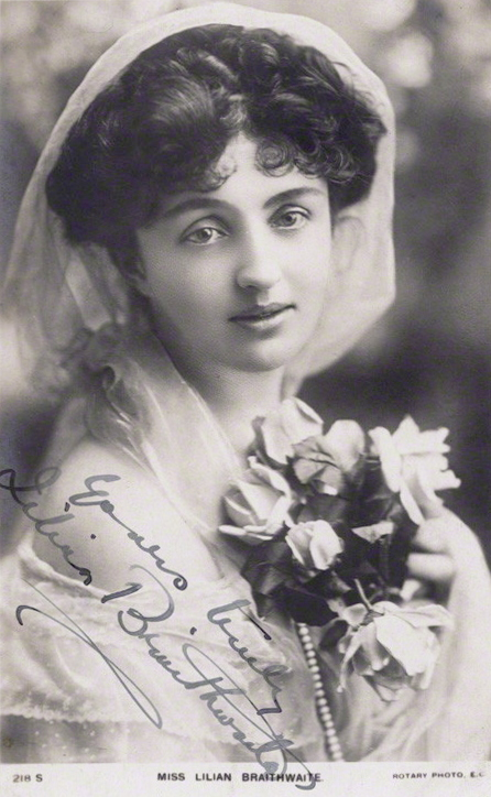 Lilian Braithwaite